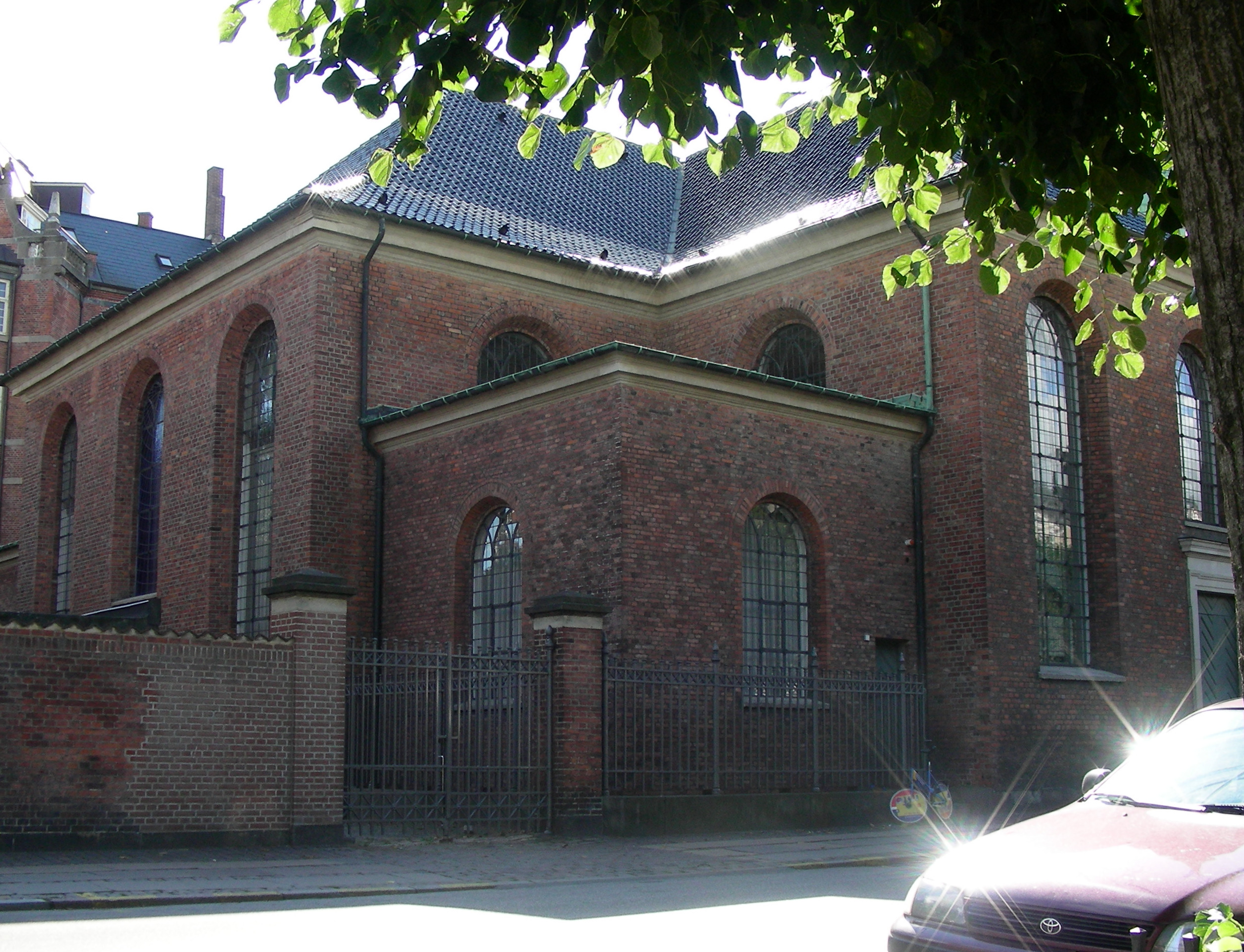 Garnisons Kirke, Copenhagen, Denmark. Add-on building from 1860.